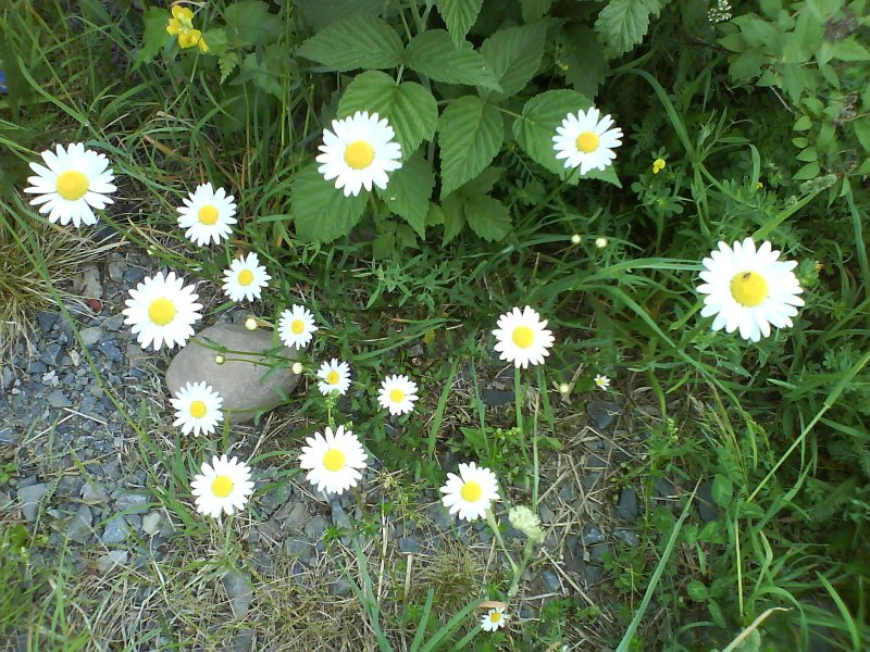 Prestekrager er vanlig å se i enger og gresskledte skråninger.